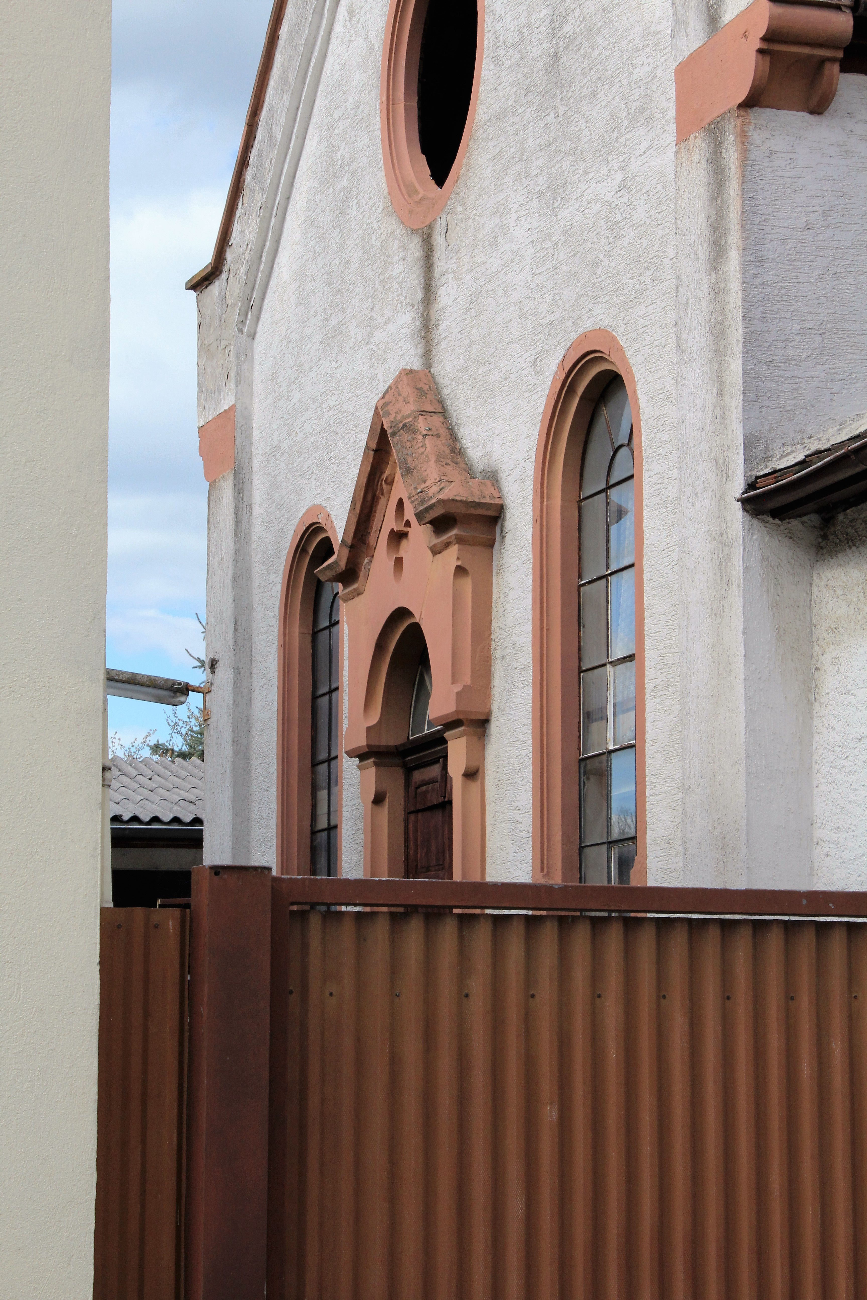 Detail - Giebelfenster- Verglasung fehlt